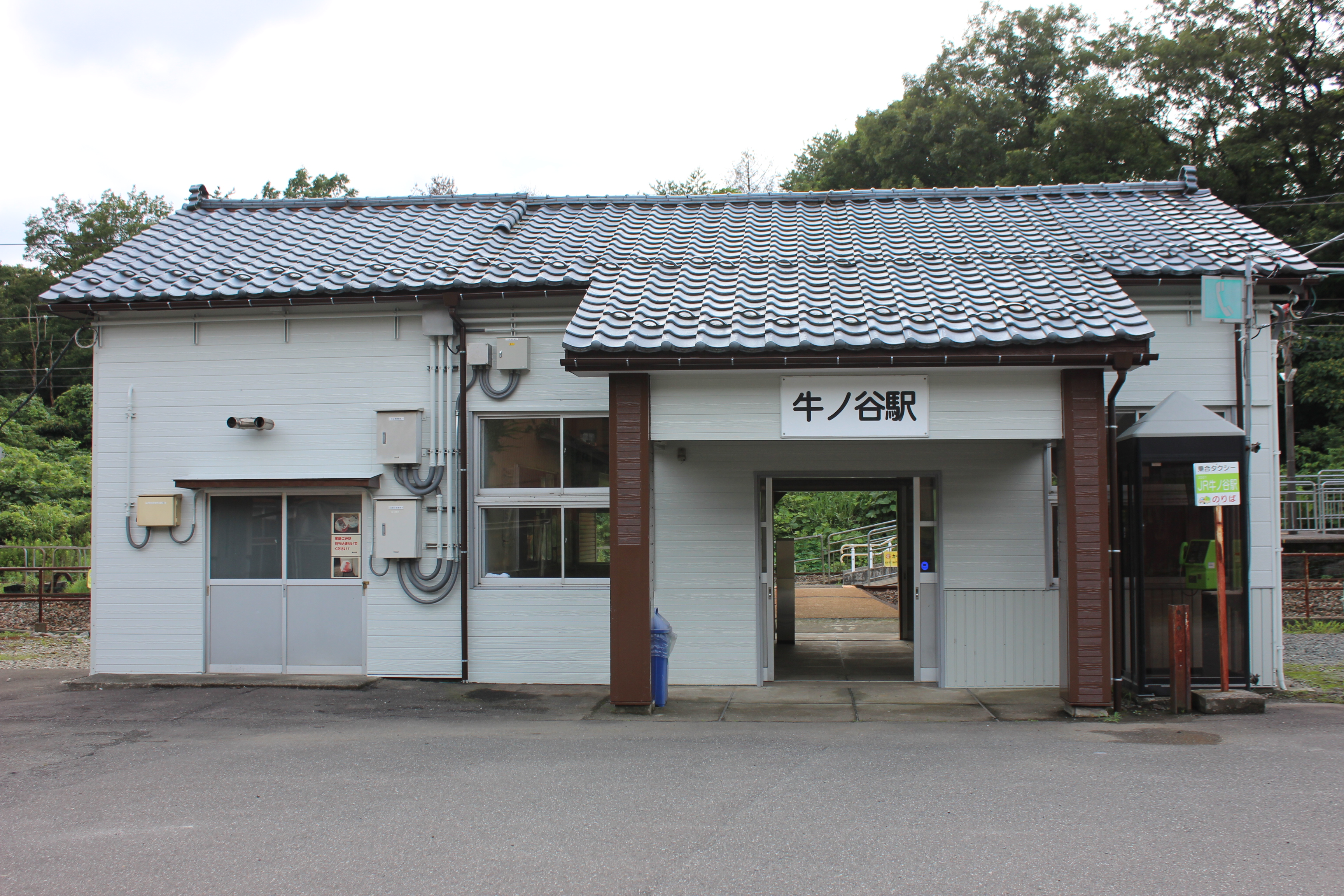 牛ノ谷駅（福井県あわら市）